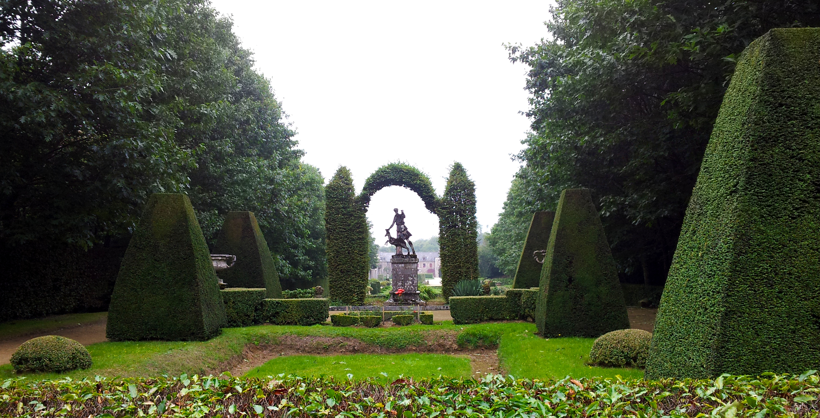 le parterre de Diane - Chateau de Caradeuc